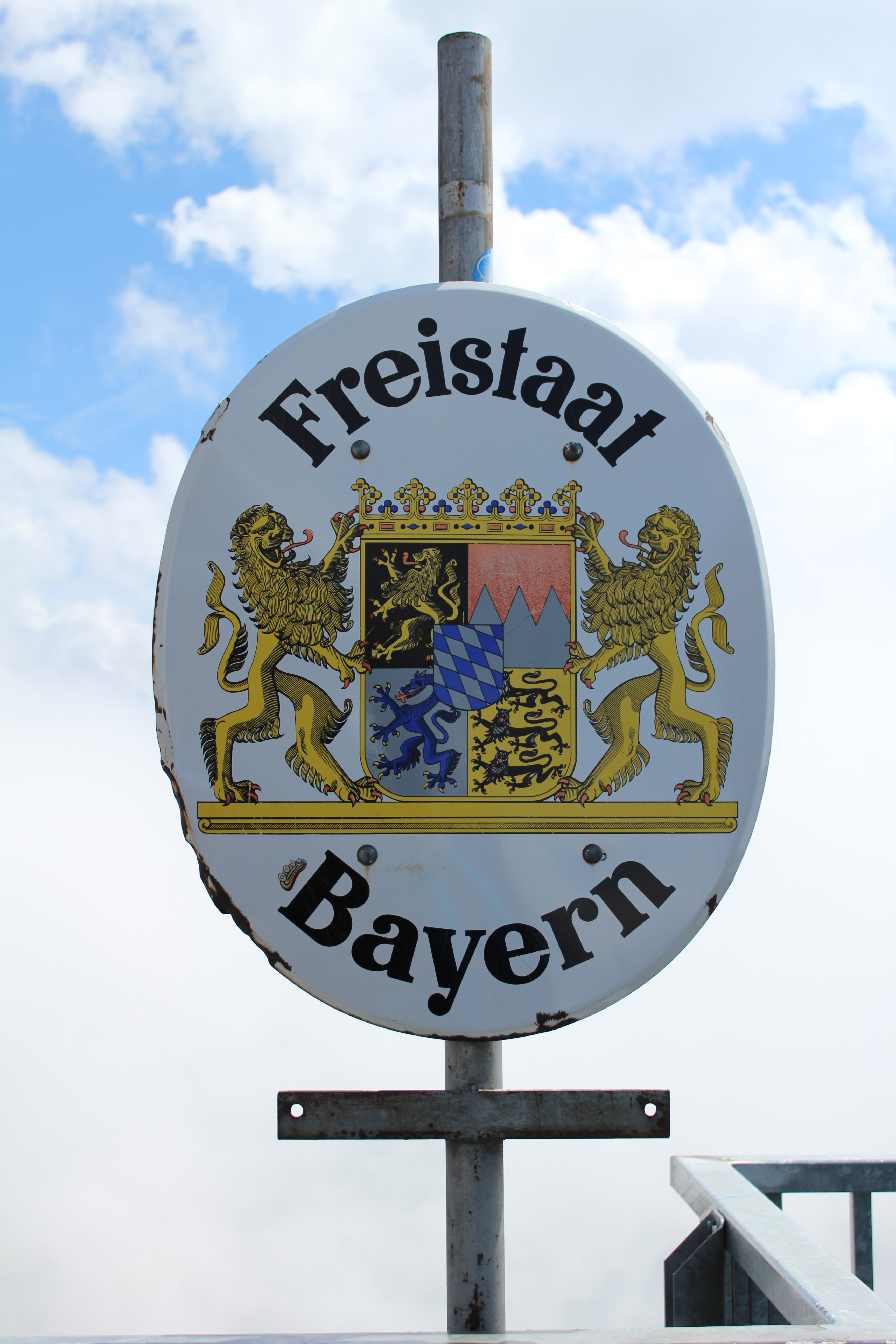 Das Grenzschild des Freistaat Bayerns an der deutsch-österreichischen Grenze auf der Zugspitze.